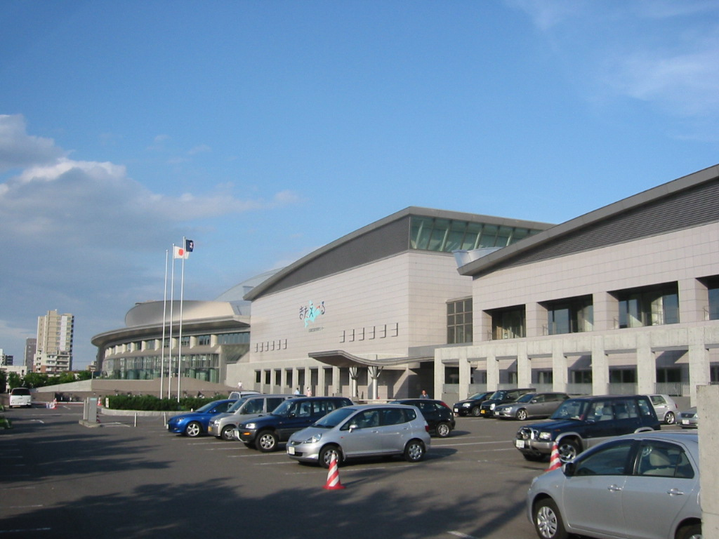 撮影場所:北海道立総合体育センター 撮影日:2007年8月14日 撮影者:モンモン Estadio Hokkaido Prefectural Sports Center, Sapporo